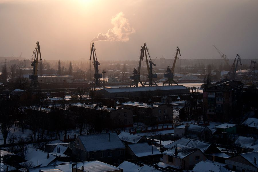 район речпорта вид с центра города